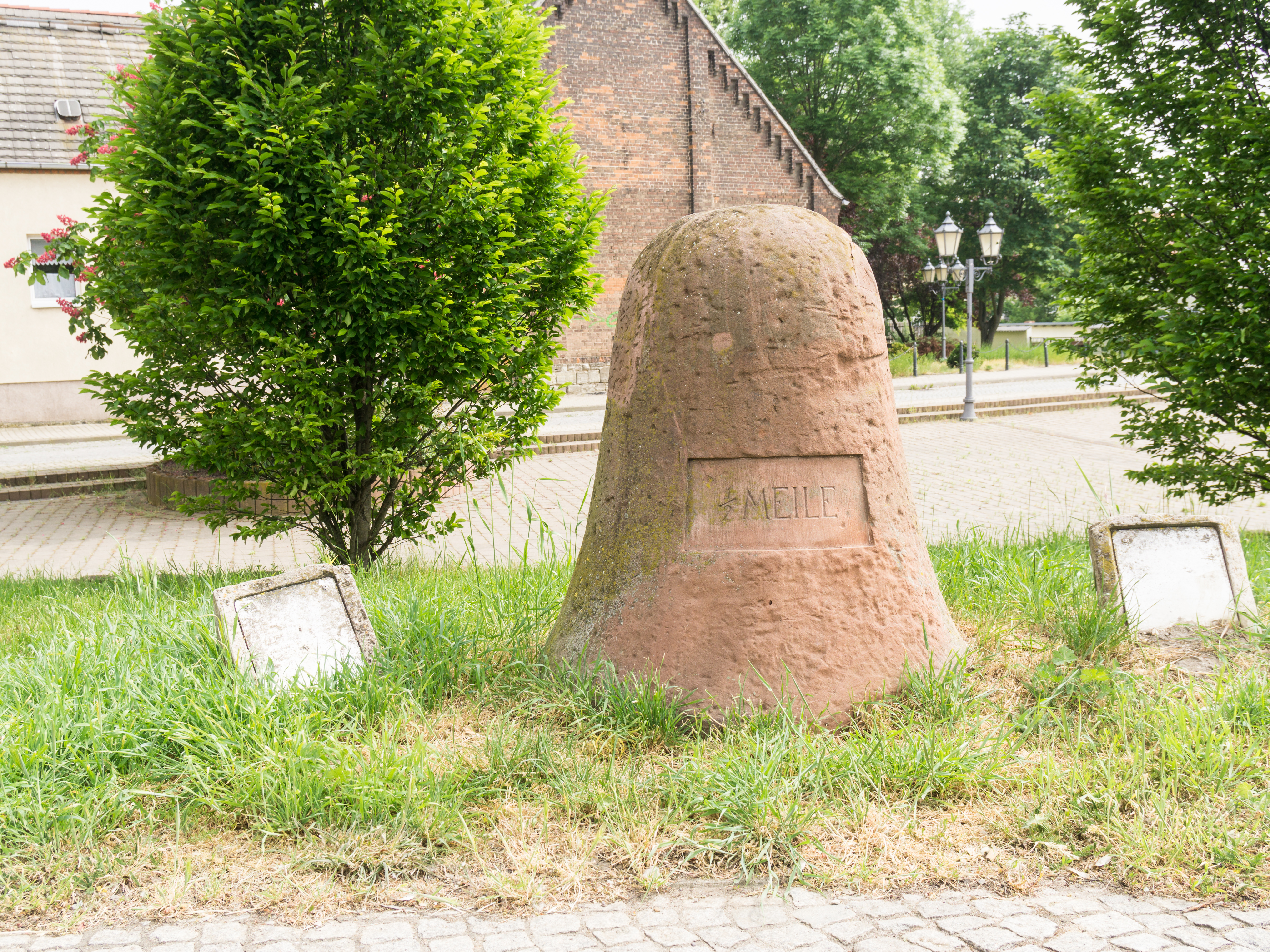 Preußischer Halbmeilenstein, Hallesche Straße in Schkopau